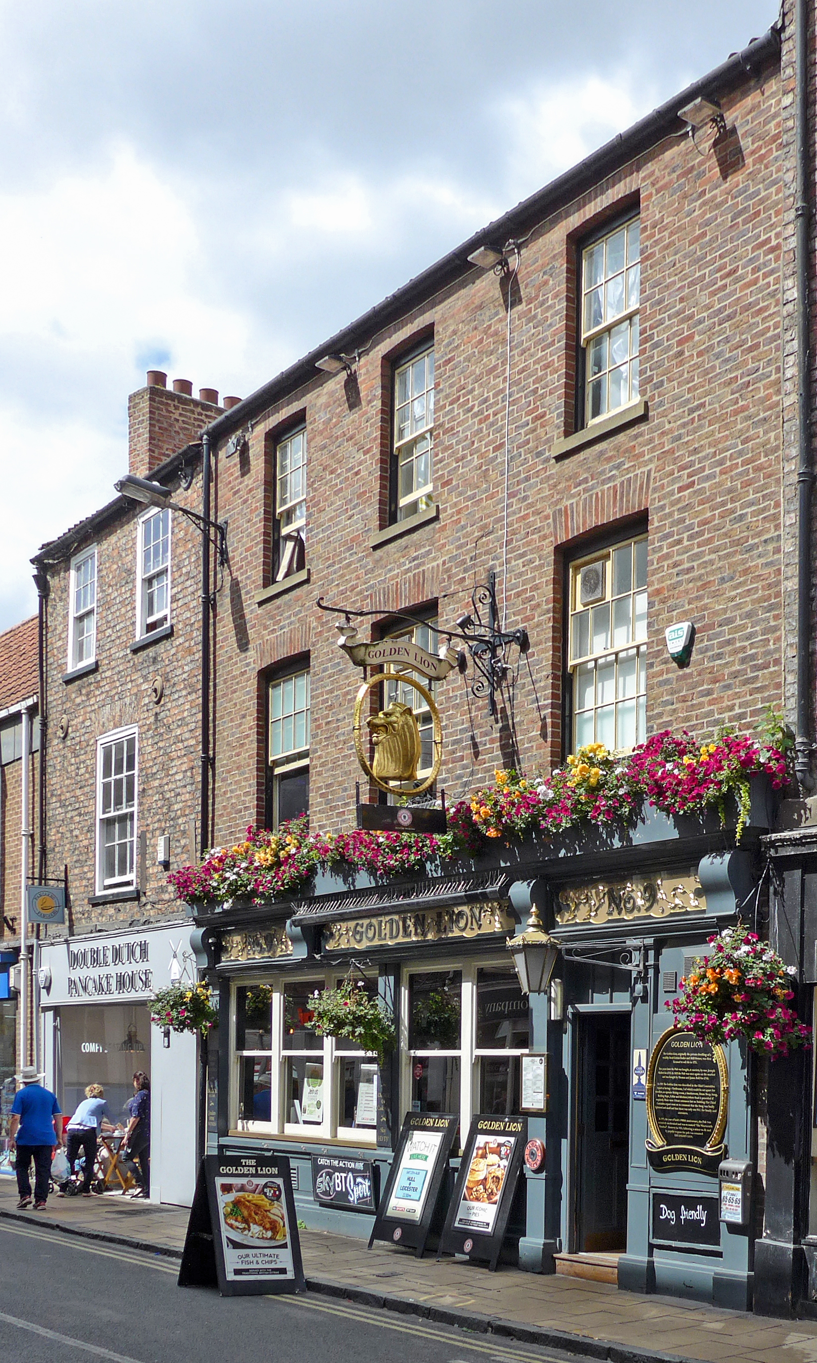 Golden Lion, York